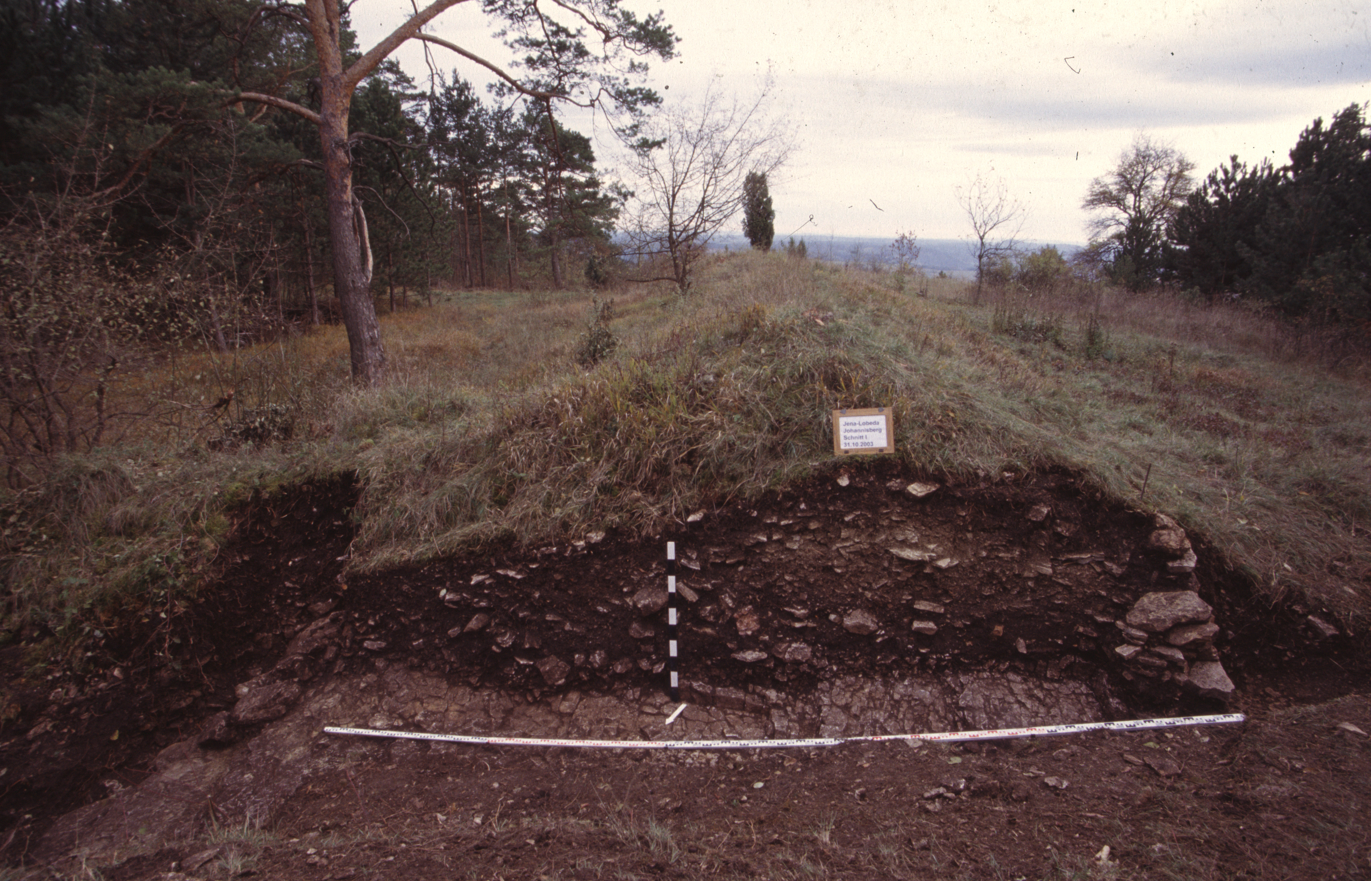 Jena-Lobeda, Johannisberg. Schnitt I durch den äußeren Wall mit den Resten der frühmittelalterlichen Befestigung bei der Grabung im Oktober 2003 (von Nord).